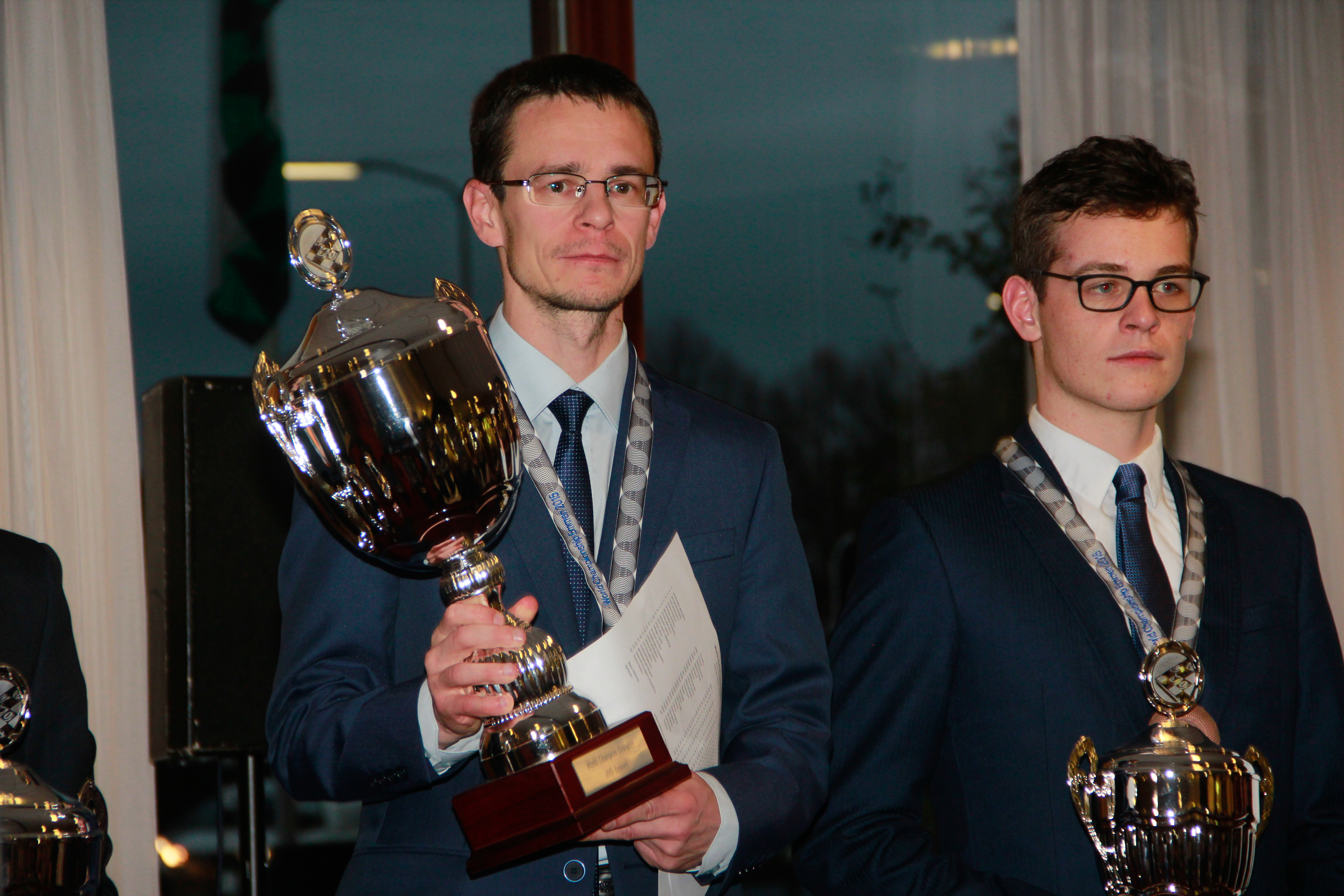 Draughts players Alexander Georgiev and Roel Boomstra during the 2015 World Draughts Championship